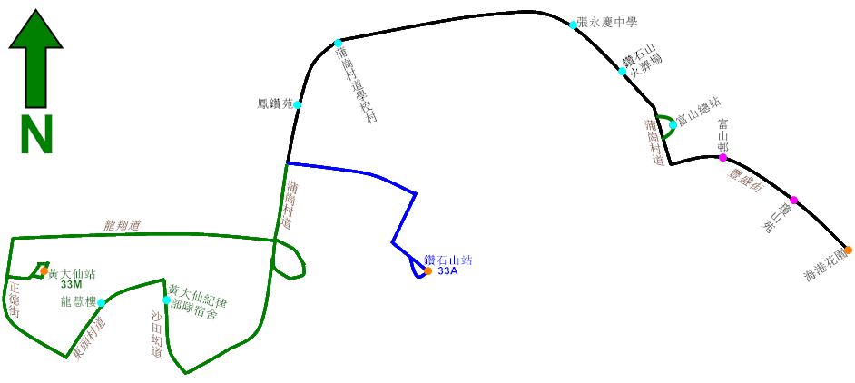 中文（香港）: 九龍專線小巴33A及33M線的走線圖，當中藍線表示只有343A駛經；而綠線則表示只有33M駛經